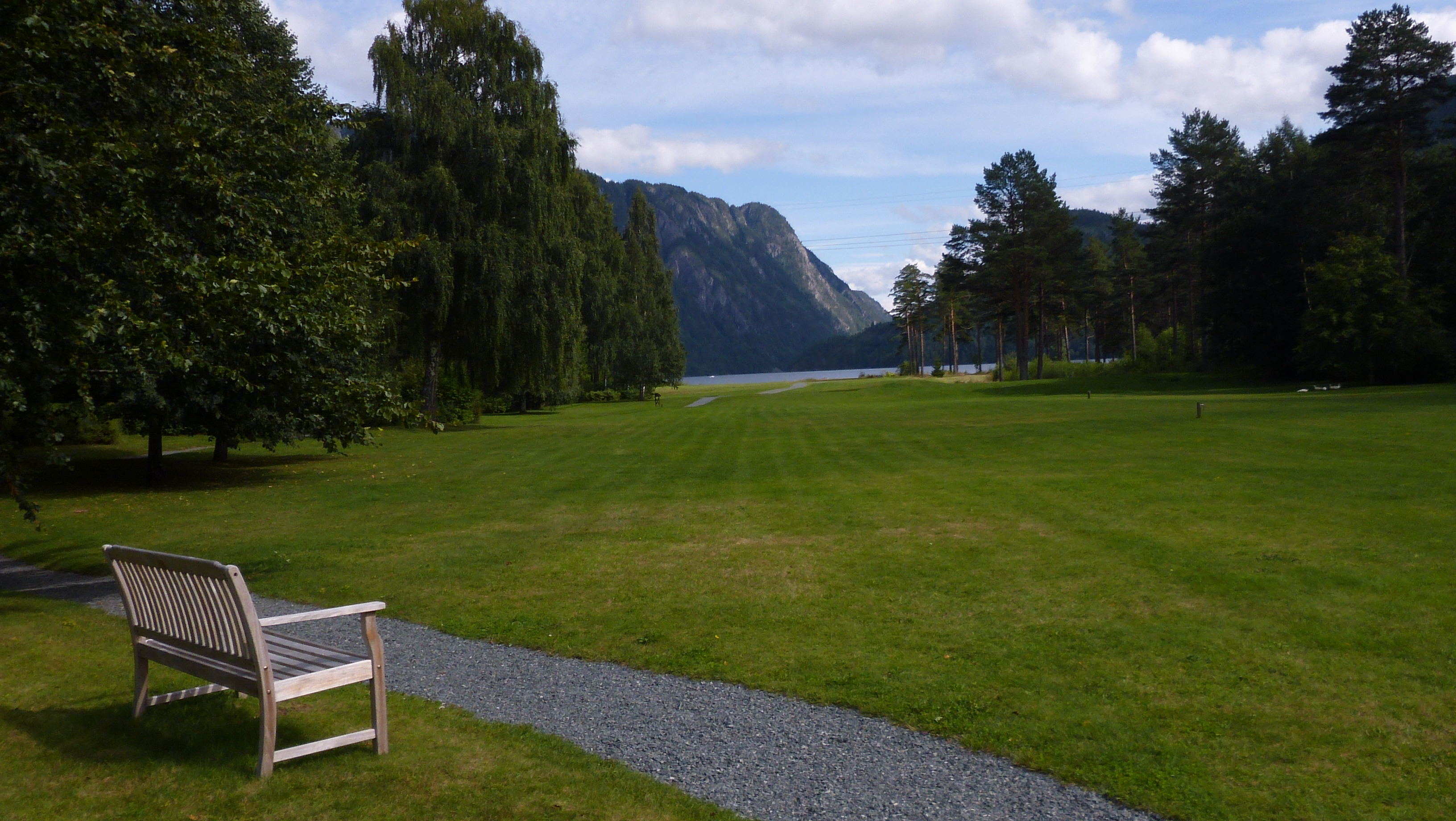 Dalen Hotel Gardens